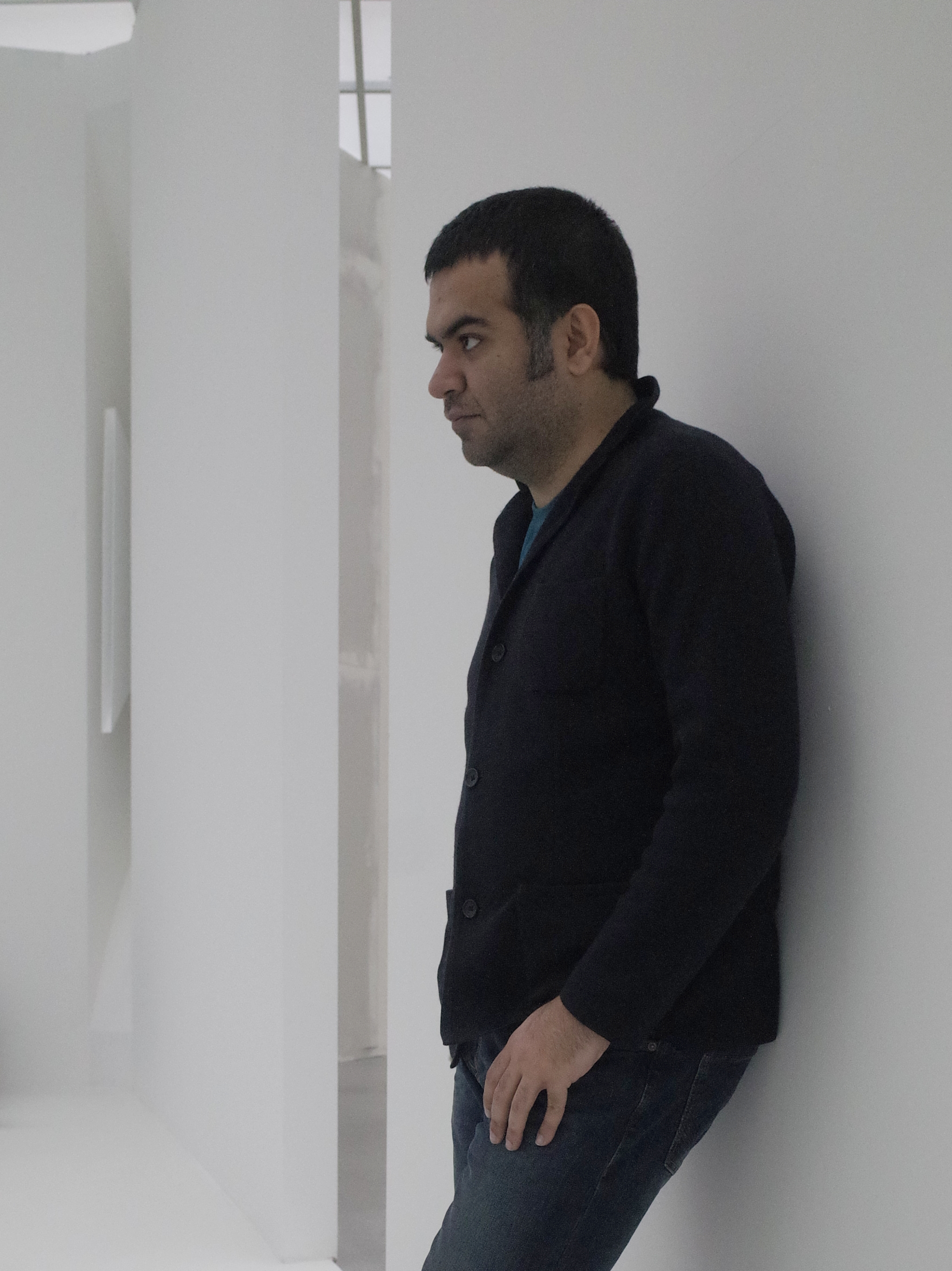 WKV :: Rauschen :: Amir Reza Koohestani